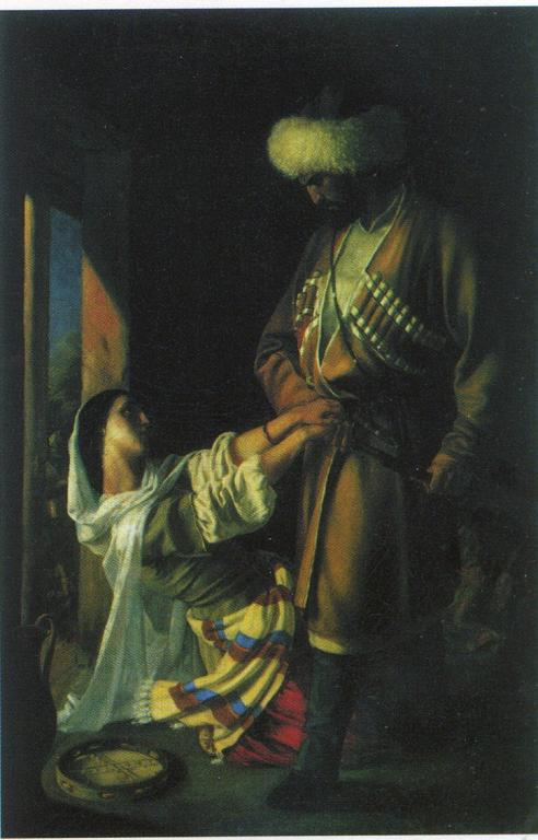 Лейла и Хаджи Абрек. 1852